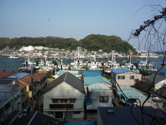 愛宕山公園より浦賀を撮影。手前が西浦賀、奥が東浦賀